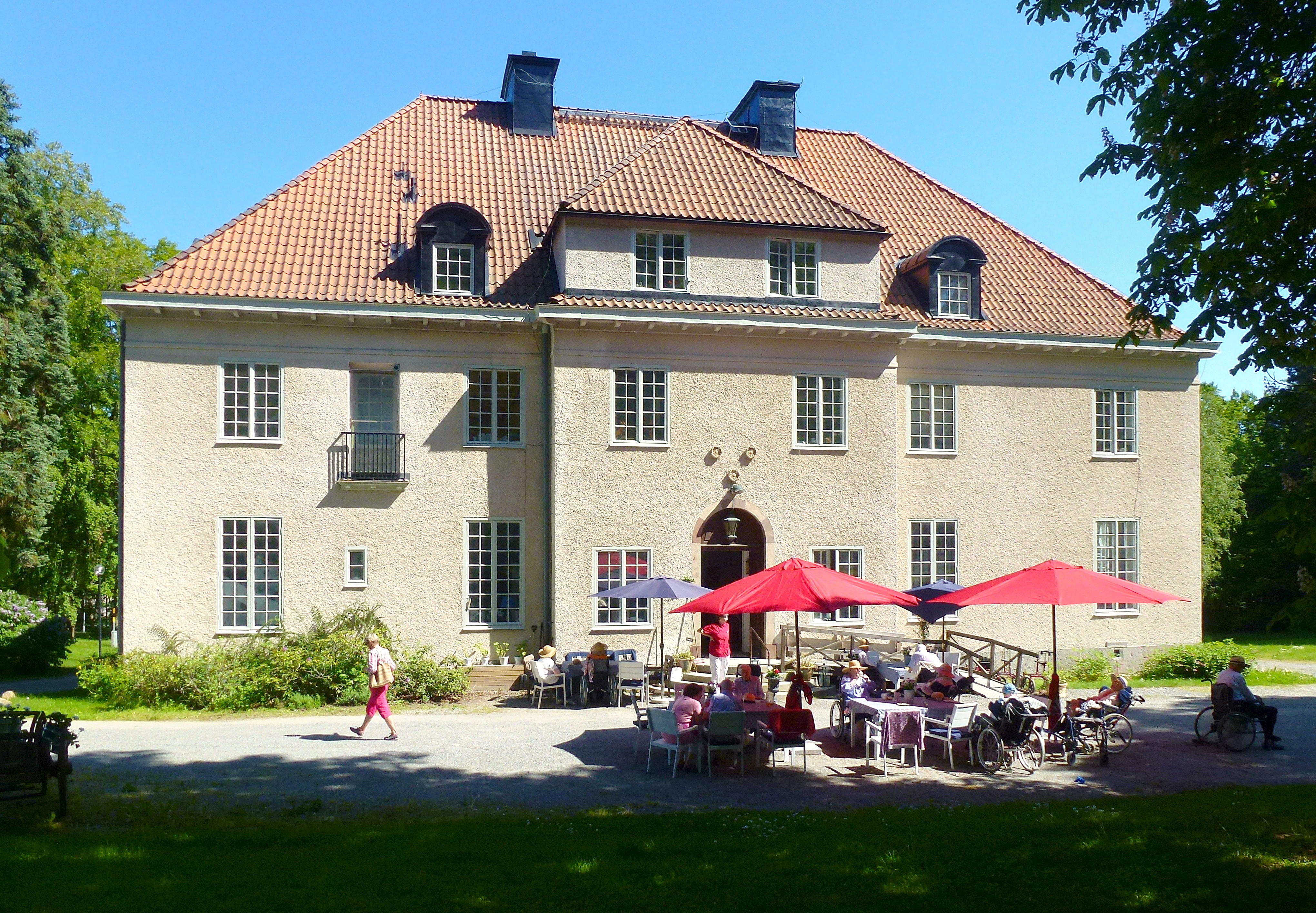 Edsby slott i Upplands Väsby